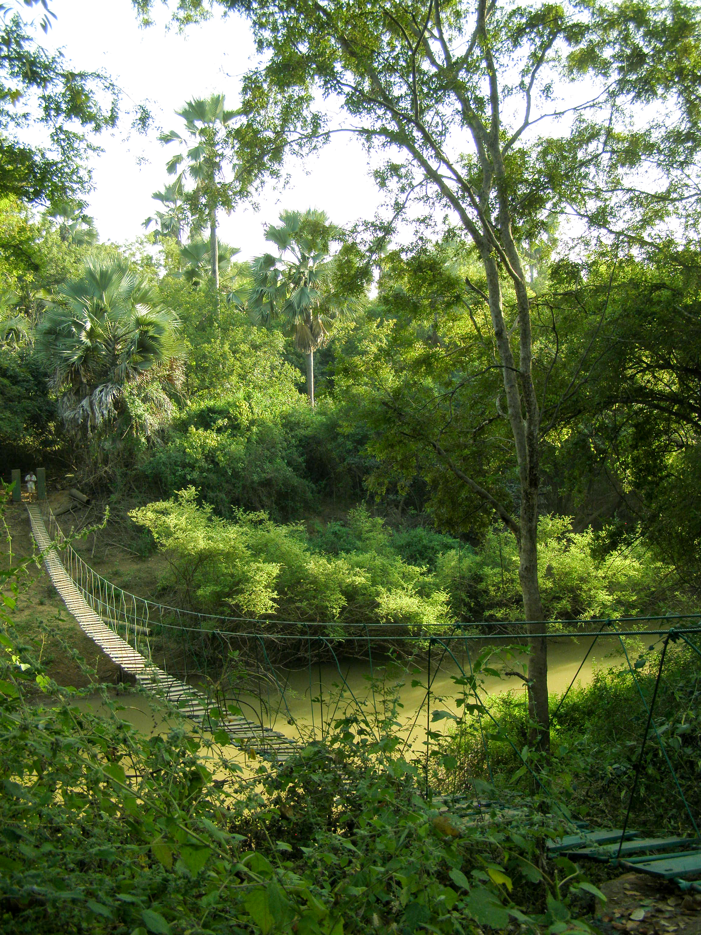 Le pont suspendu - Parc national du Niokolo-Koba - Sénégal